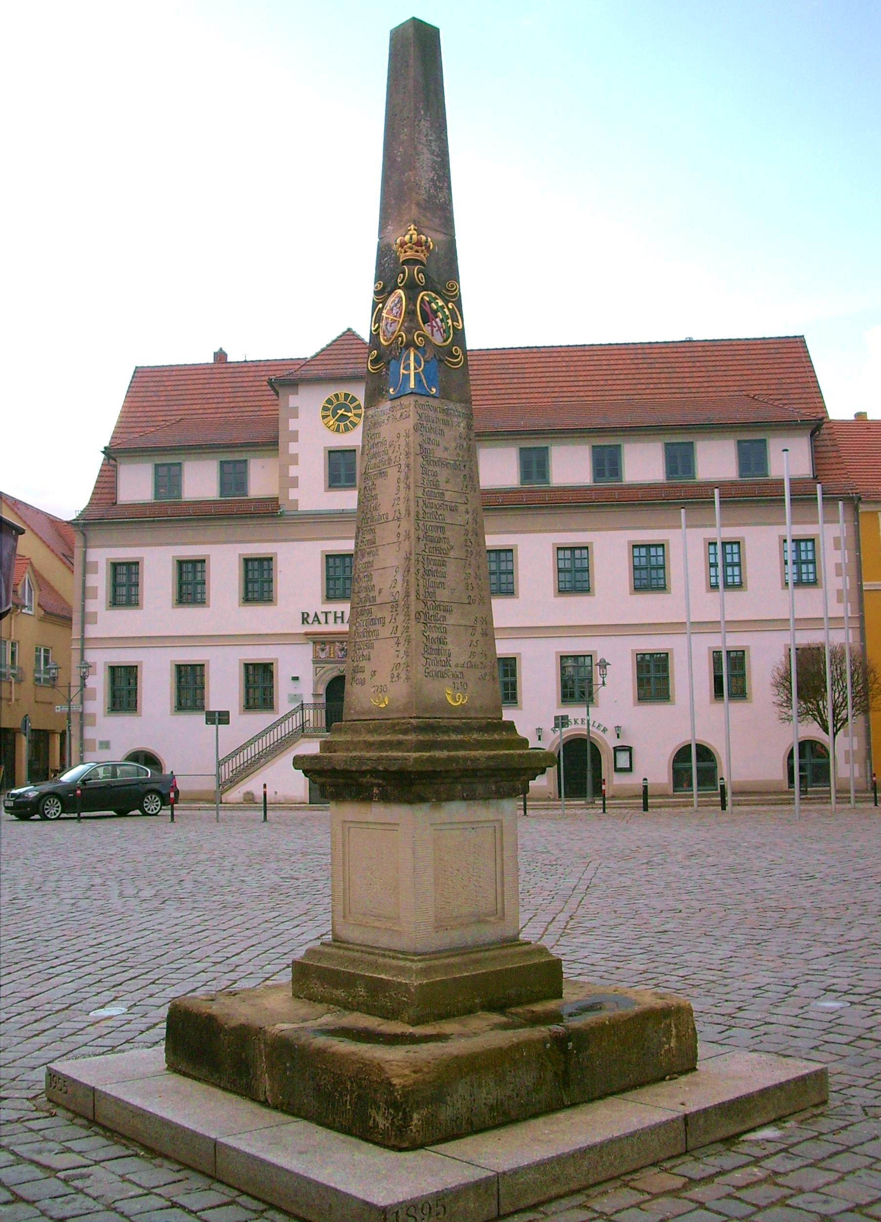 Postdistanzsäule mit Altem Rathaus im Hintergrund, Markt in Hoyerswerda